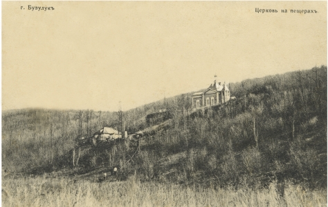 Российская империя. Бузулук. Спасо-Преображенский монастырь. Церковь на пещерах